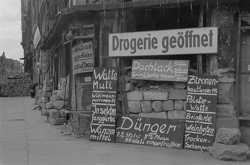 Original image description from the Deutsche FotothekEugeba-Drogerie in noch nutzbaren Erdgeschoßräumen, davor zahlreiche Angebotstafeln für nachkriegstypische Waren